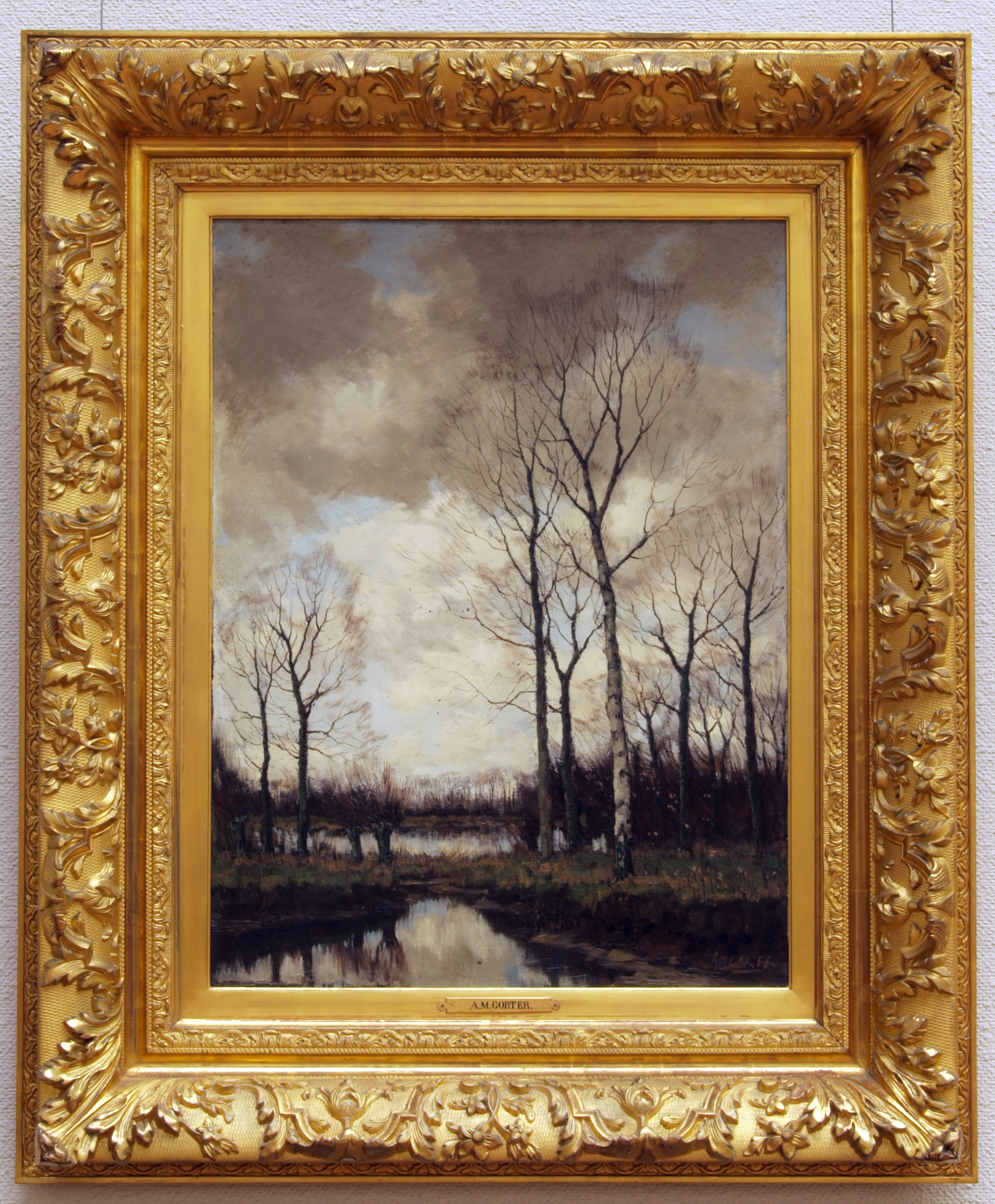 Arnold Marc Gorter (1866-1933), Novemberstemming, 1905, Olieverf op doek